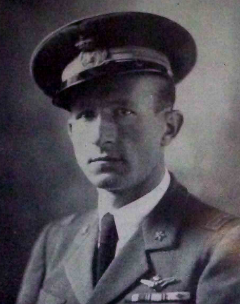 Aviatore decorato con Medaglia D'Oro al Valore Aeronautico